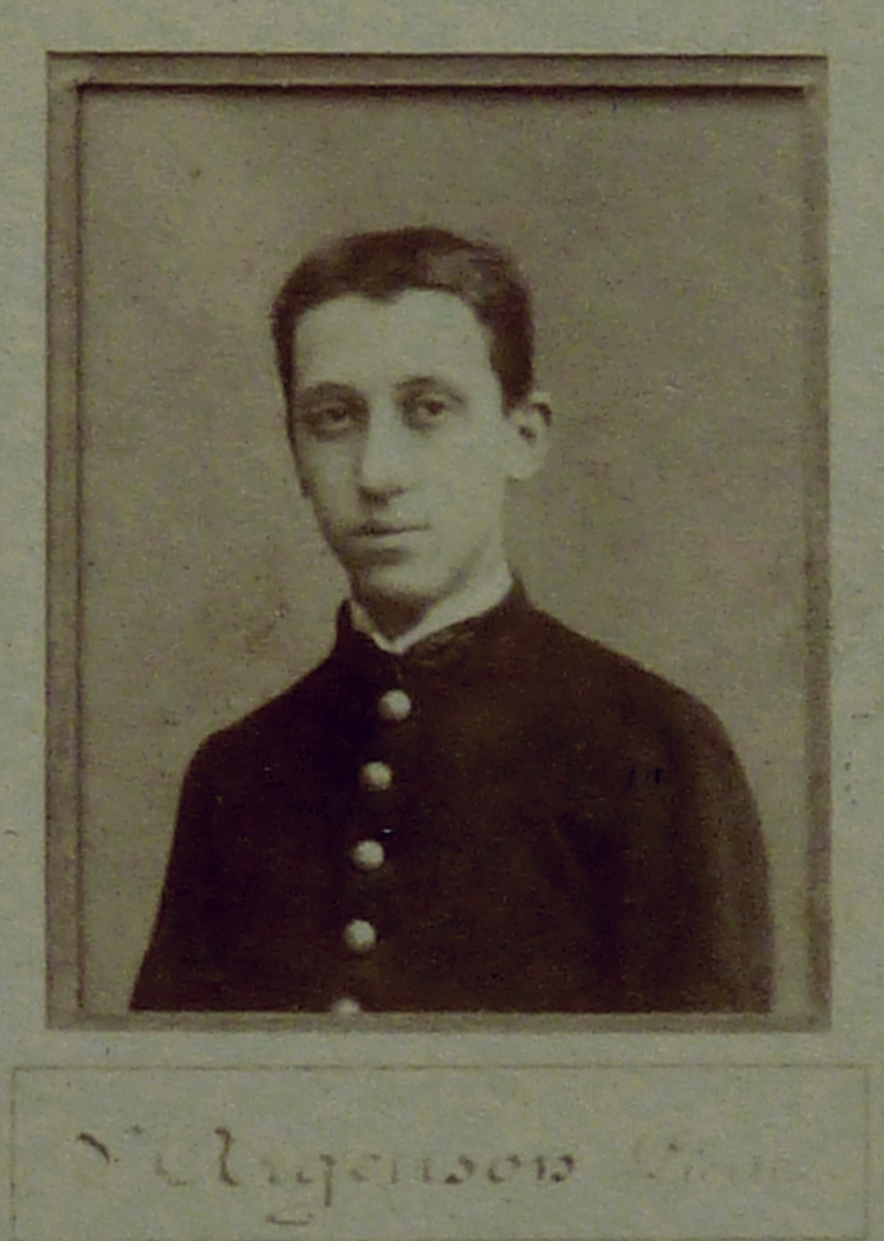 Pierre d'Argenson en 1894, détail d'une photo des élèves du Collège Stanislas. Pierre Petit photographe. Taille du cliché d'origine : 2,5 x 3 cm.